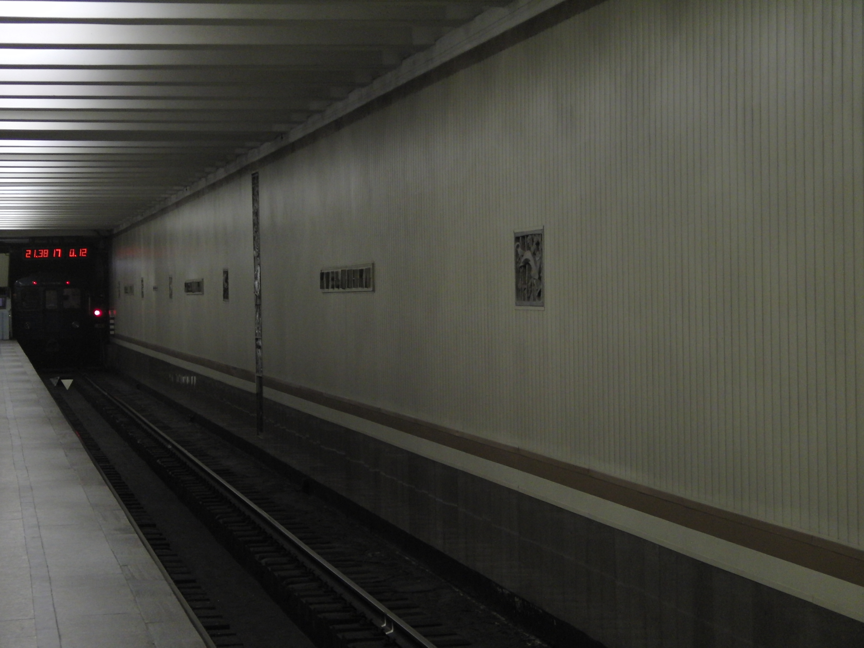 Kuzminki (Кузьминки)